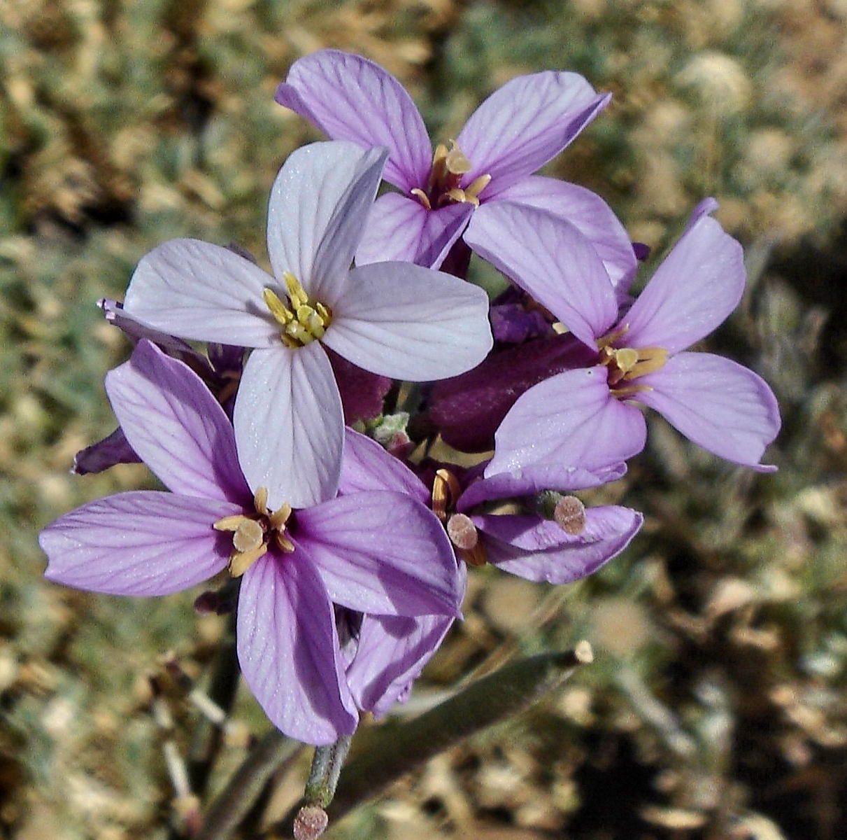 Erysimum es un género de plantas dicotiledónea de la familia de las Brassicaceae (o Crucíferas). Hay alrededor de 220 especies, originarias del suroeste de Asia, la región mediterránea, Macaronesia, y Norteamérica. El Erysimum Scoparium, o localmente llamada "Alhelí del Teide" es un endemismo que crece casi exclusivamente en las Cañadas del Teide (Tenerife), aunque tambien crece en las zonas mas altas de algunas laderas de la Caldera de Taburiente (La Palma) Erysimum scoparium